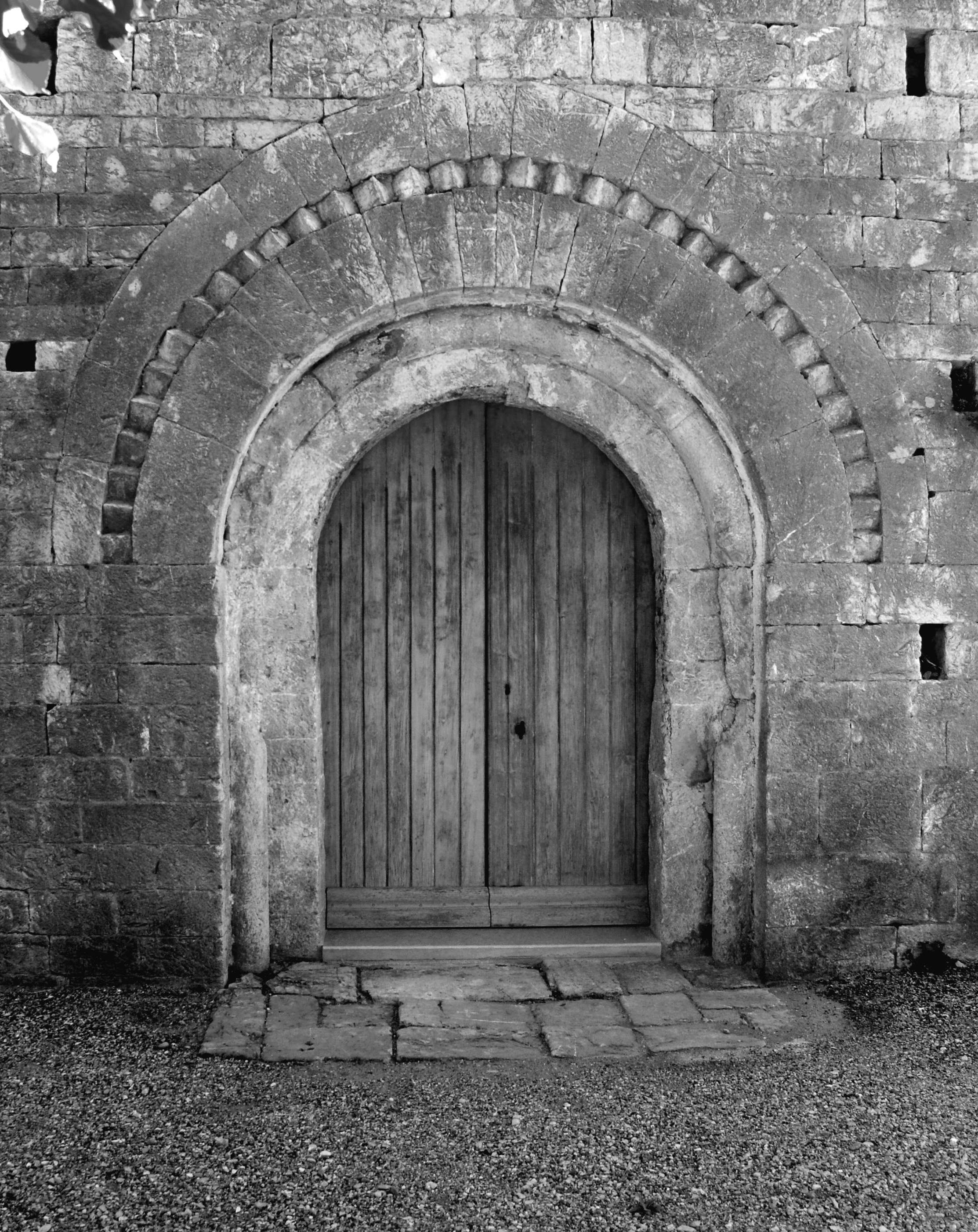 France - Hérault - Église de Saint-André-de-Buèges (photo intentionnellement chargée en noir et blanc)